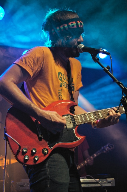 Julien Mineau du groupe Malajube. Malajube est un groupe de rock indépendant originaire de Montréal.